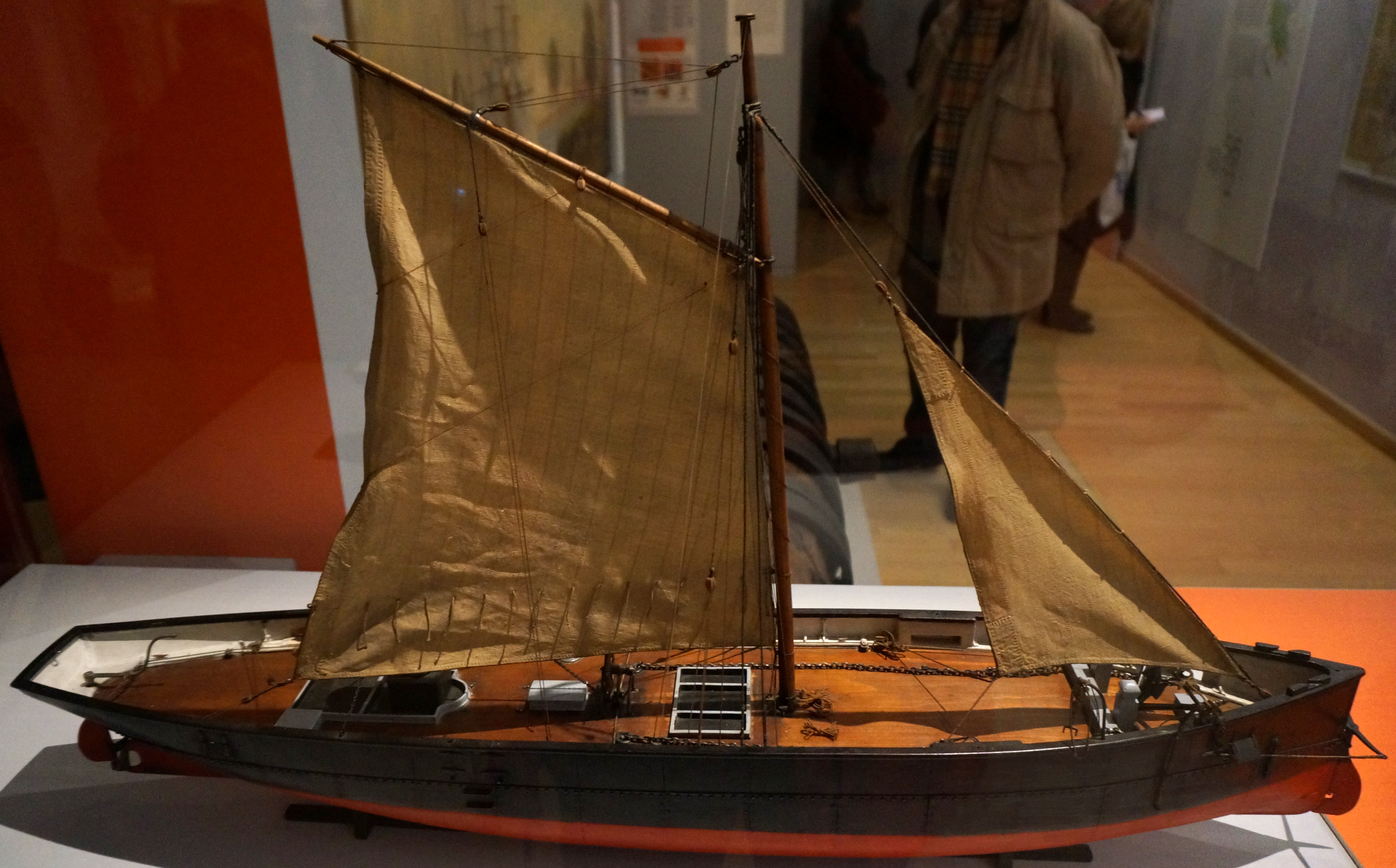 Lors de l'exposition Indochine des territoires et des hommes 1856 1956.